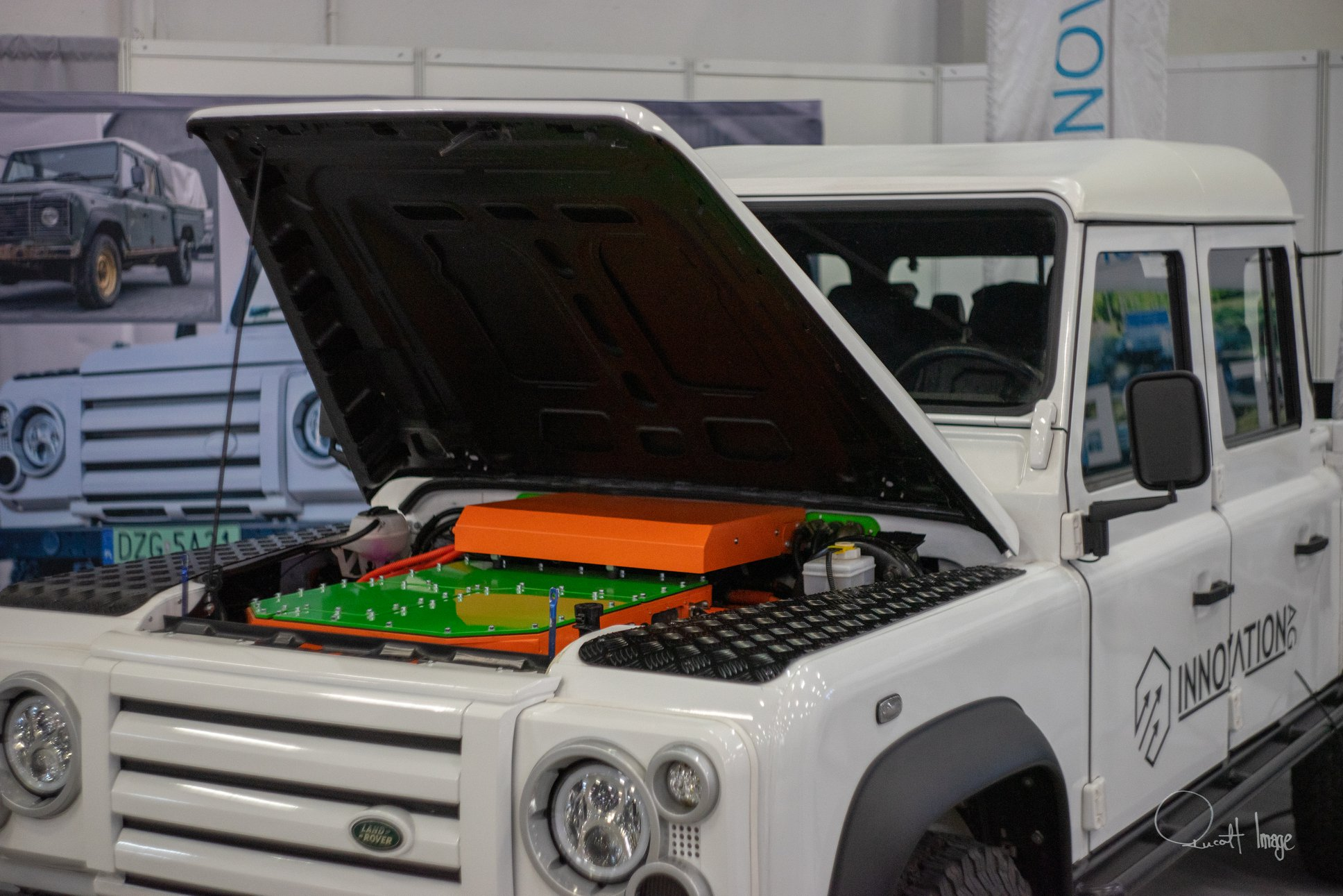 Sokół 4x4 – pierwszy polski w pełni elektroniczny pojazd stworzony metodą ekokonwersji